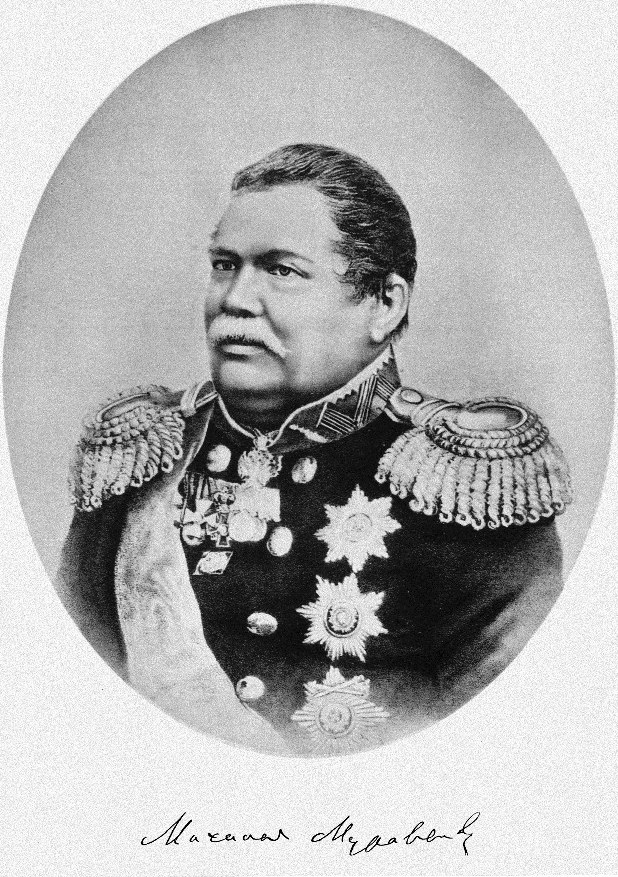 Муравьёв-Виленский, Михаил Николаевич, портрет и факсимиле из юбилейного издания "Министерство внутренних дел. 1802-1902. Исторический очерк" СПб 1901